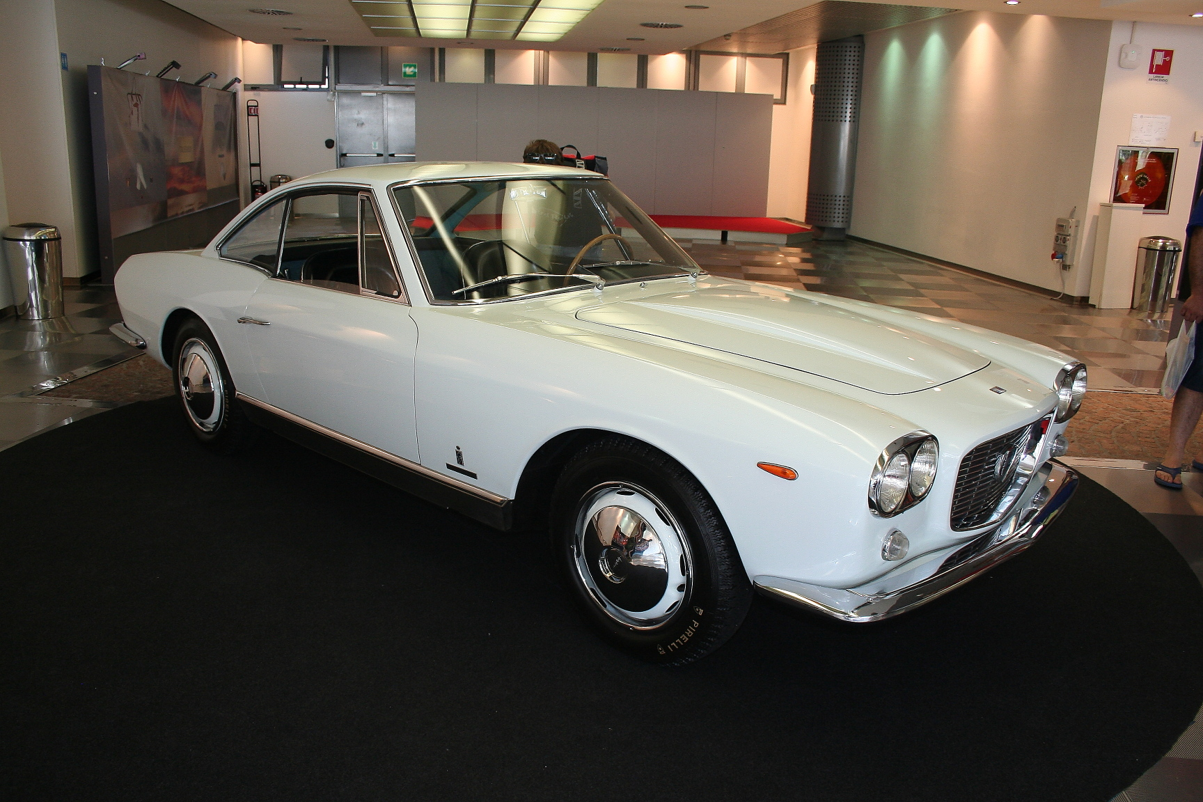 62° Coppa Intereuropa - Autodromo Nazionale Monza - 21-06-2015